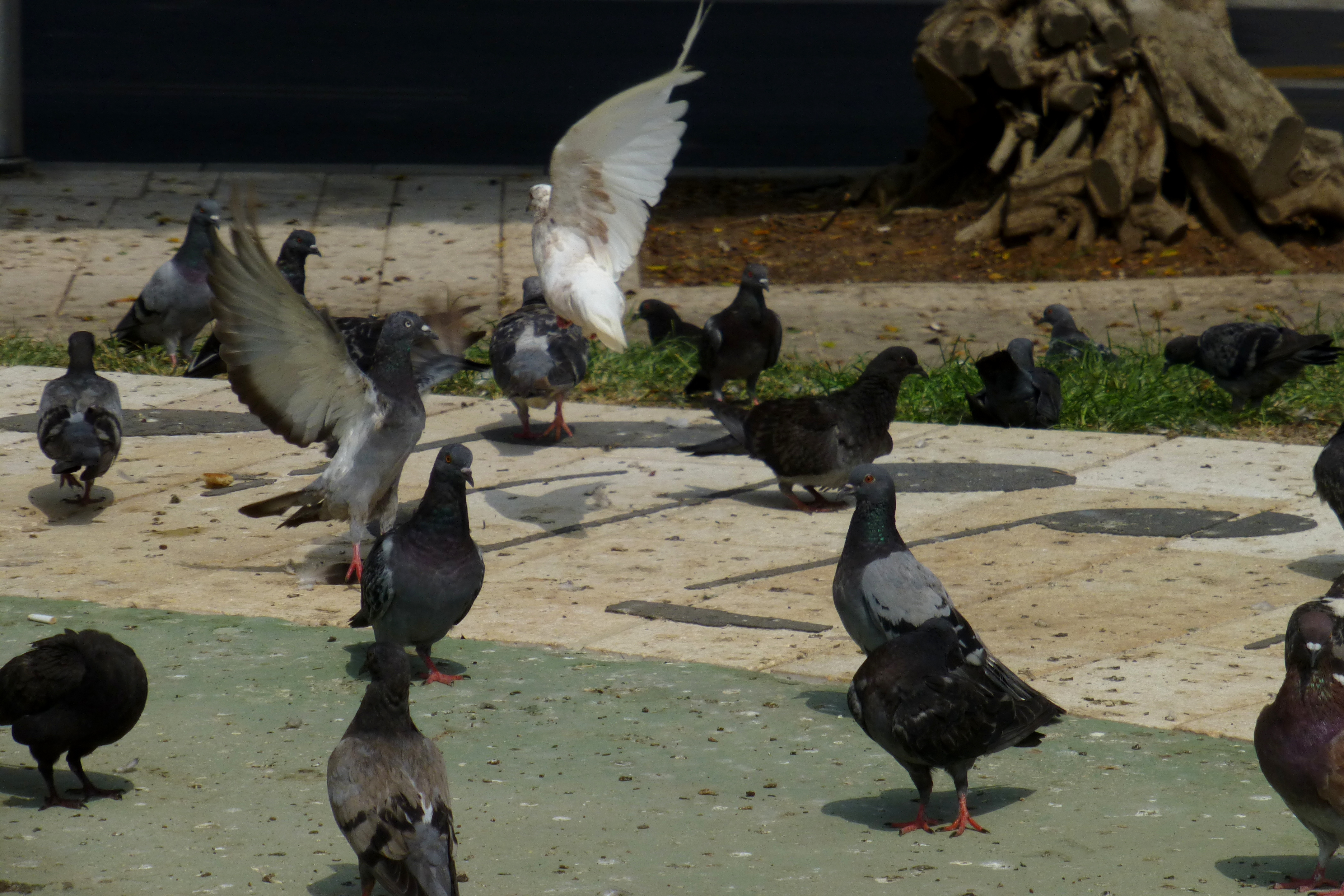 כיכר המייסדים, כיכר מרכזית בפתח תקווה, שוכנת במיקום הבתים הראשונים שנבנו בפתח תקווה בשנת 1878. כבר בימי העלייה השנייה שימשה כמקום מפגש ובילויים.